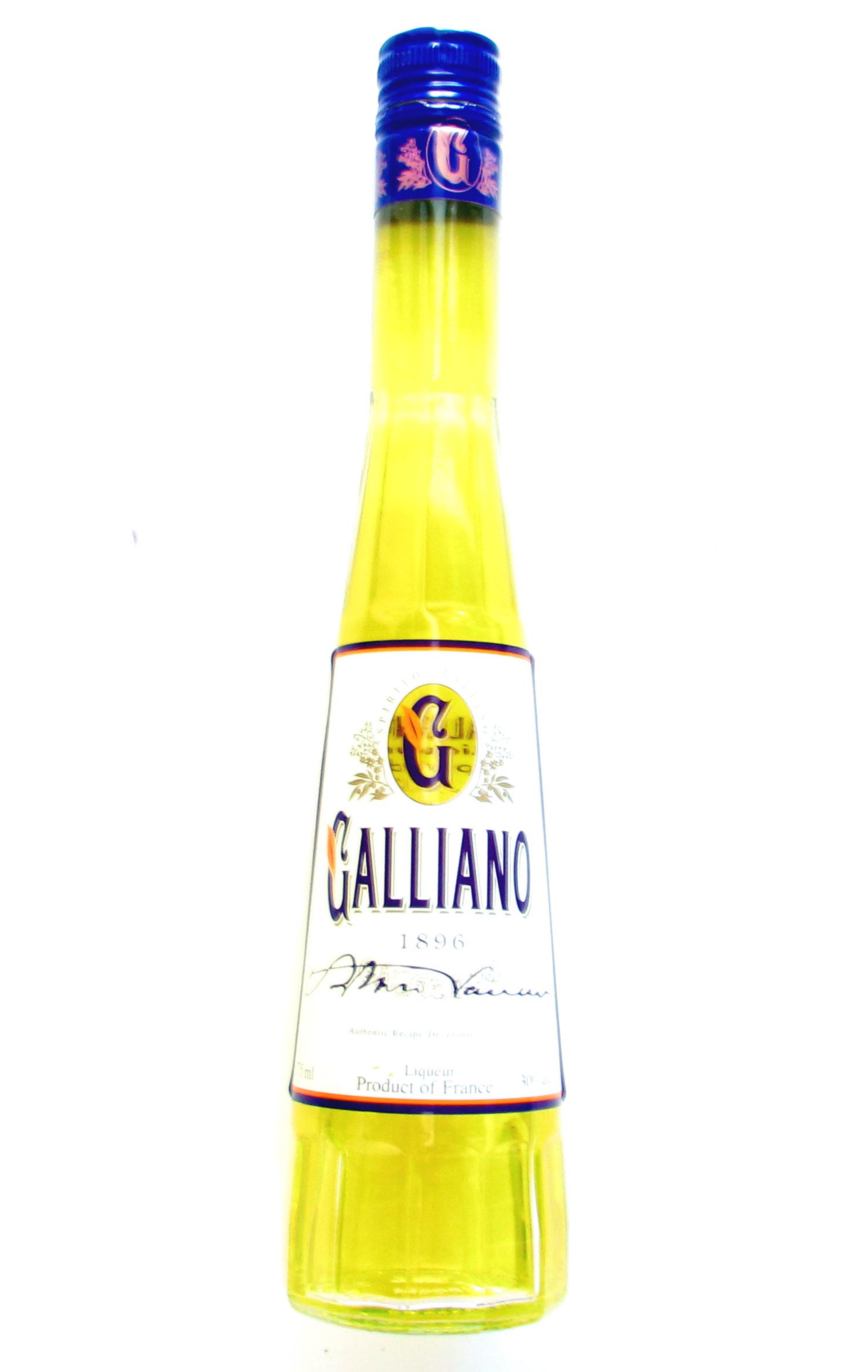 Une bouteille de la liqueur Galliano